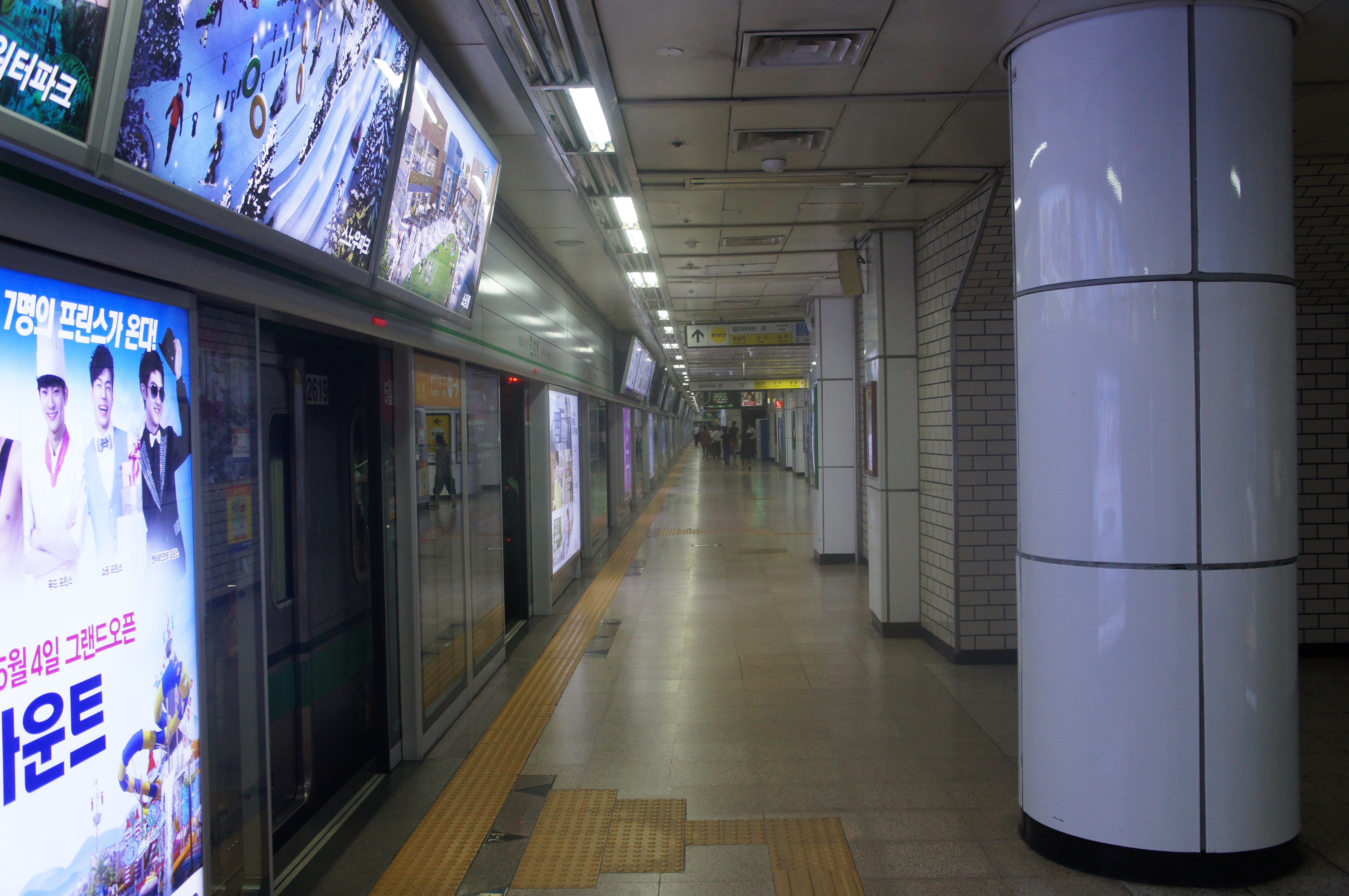 2호선 선릉역 승강장